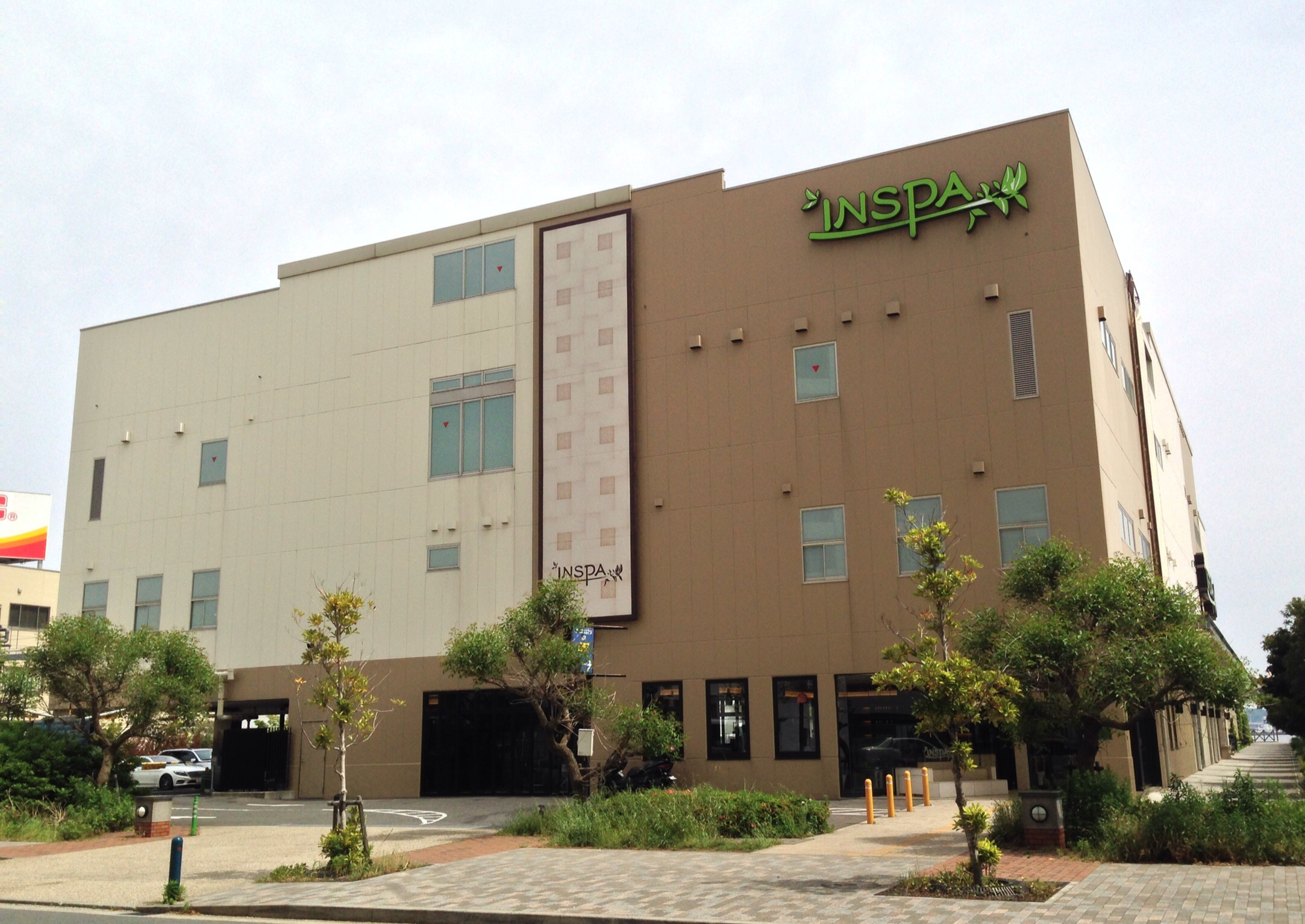 2013年12月にリニューアルオープンした「INSPA横浜」。